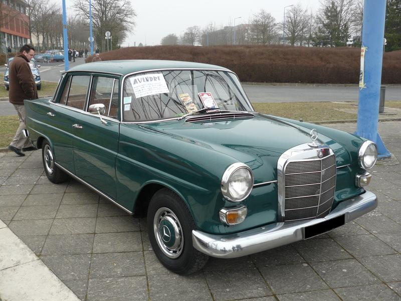 Reims 2012